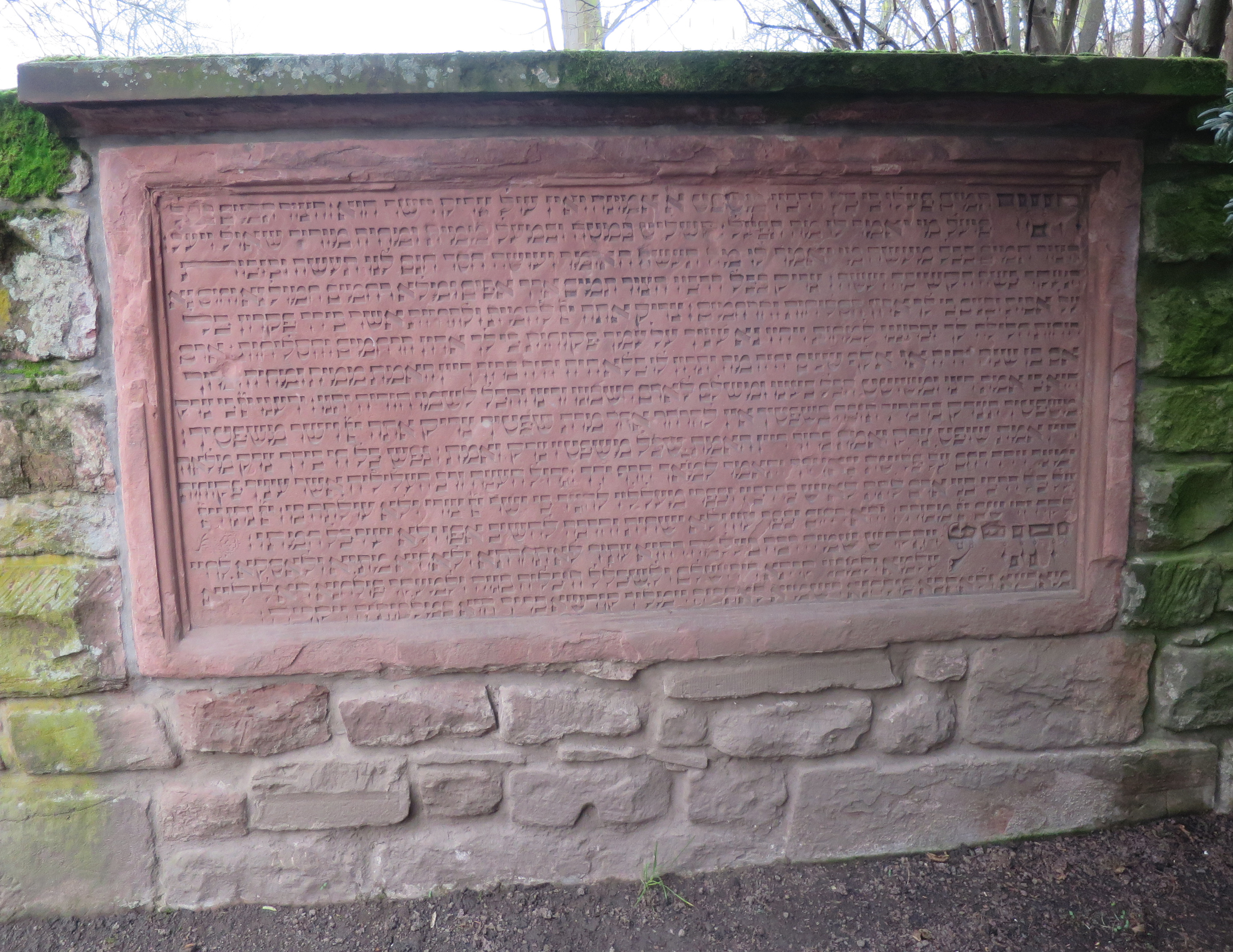 Totengebet im Eingangsbereich des "Heiligen Sandes", Worms